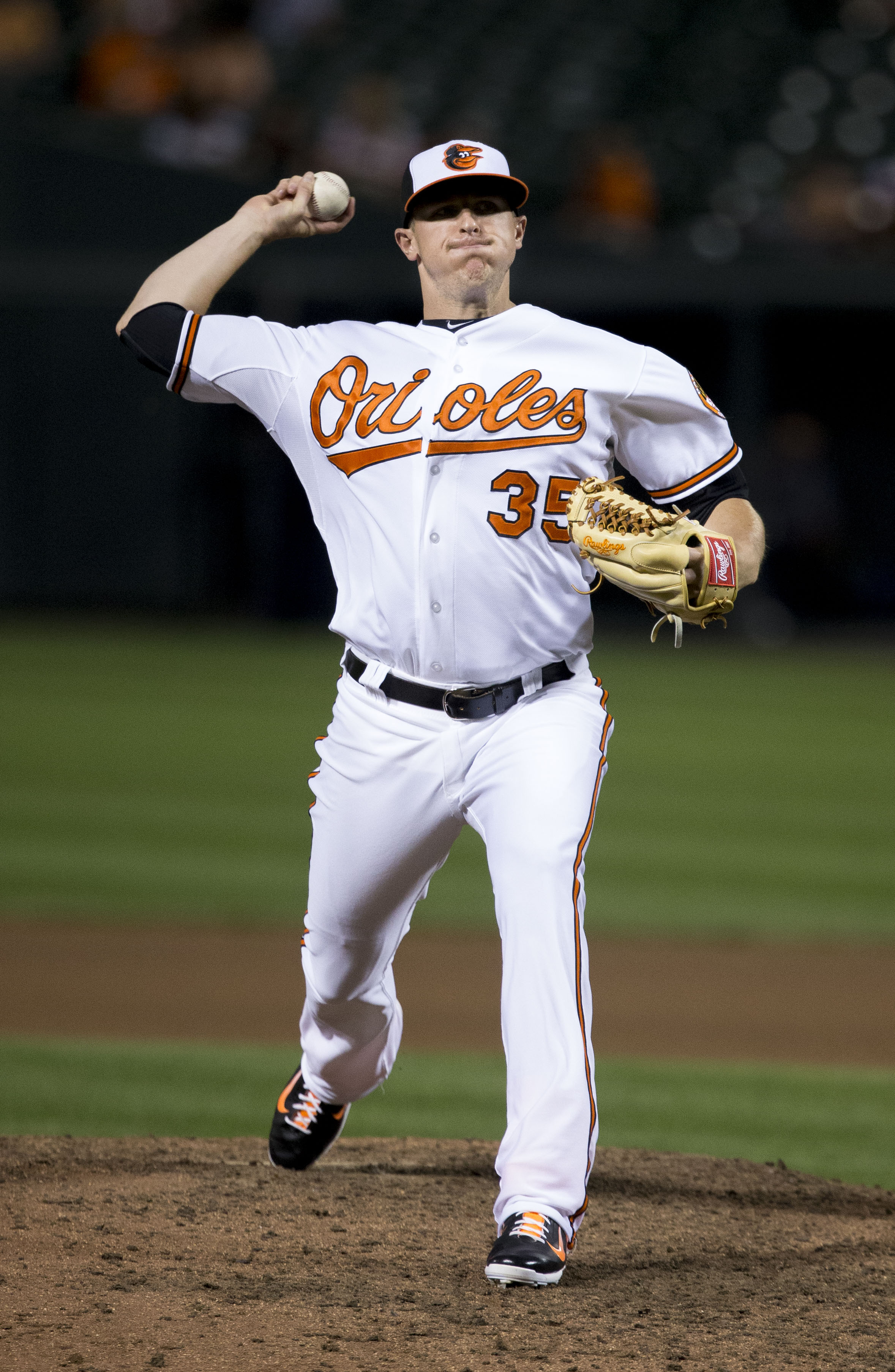 Brad Brach